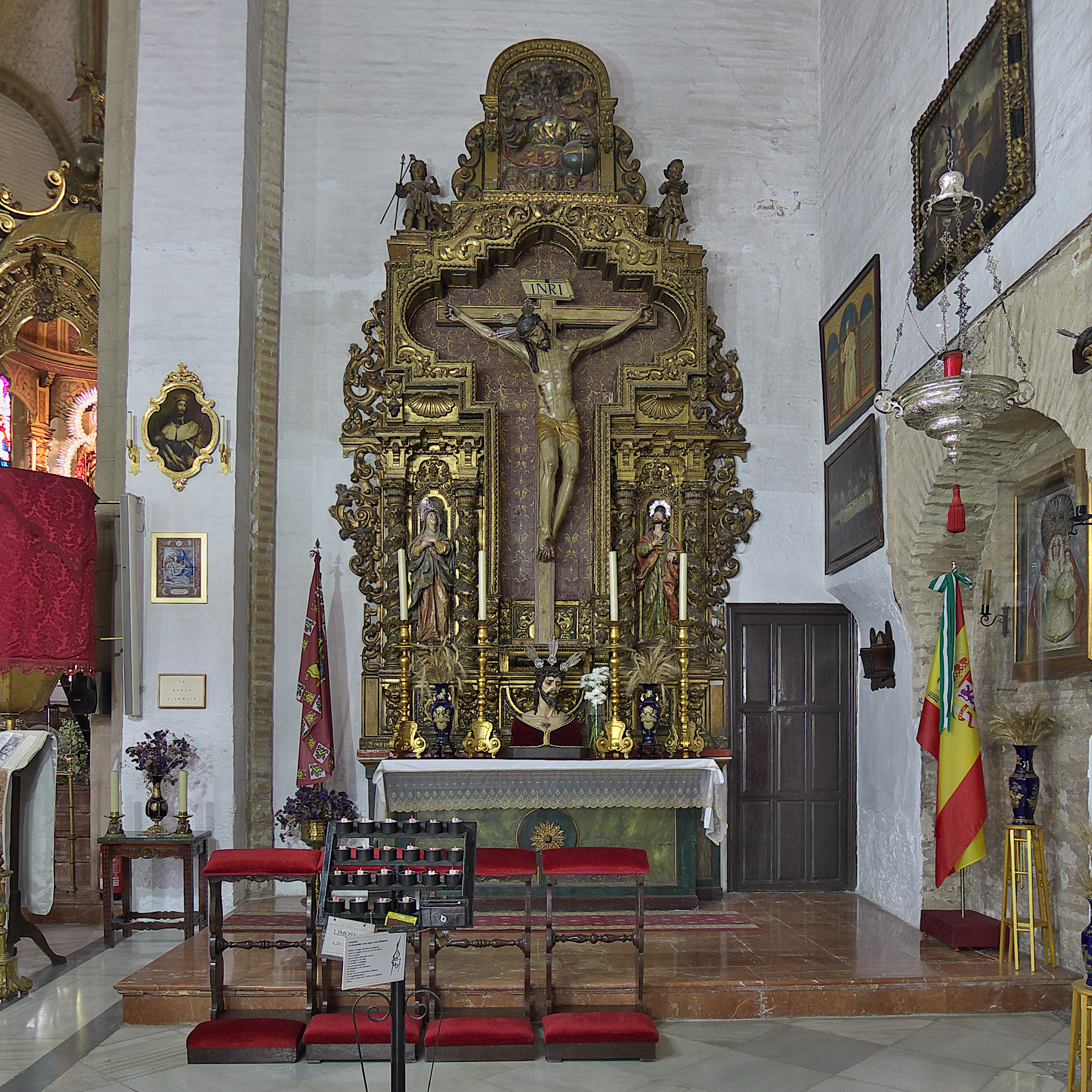 Iglesia de Omnium Sanctorum (Sevilla). Procede de la Iglesia de Santa Ana (Sevilla). Obra atribuída al escultor jiennense Andrés de Ocampo (h. 1592). El retablo está datado en 1690.